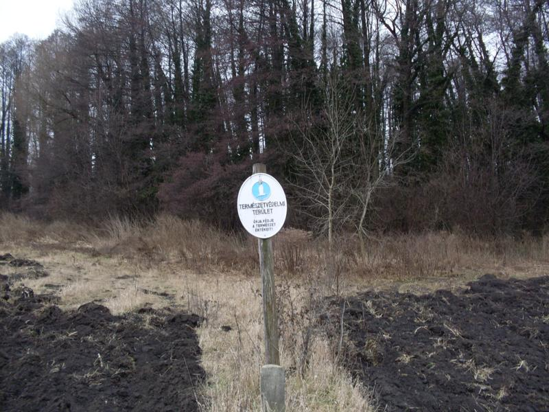 Égerláp és az intenzív szántó találkozása (Erdőtelki Égerláp Természetvédelmi Terület, Heves megye)